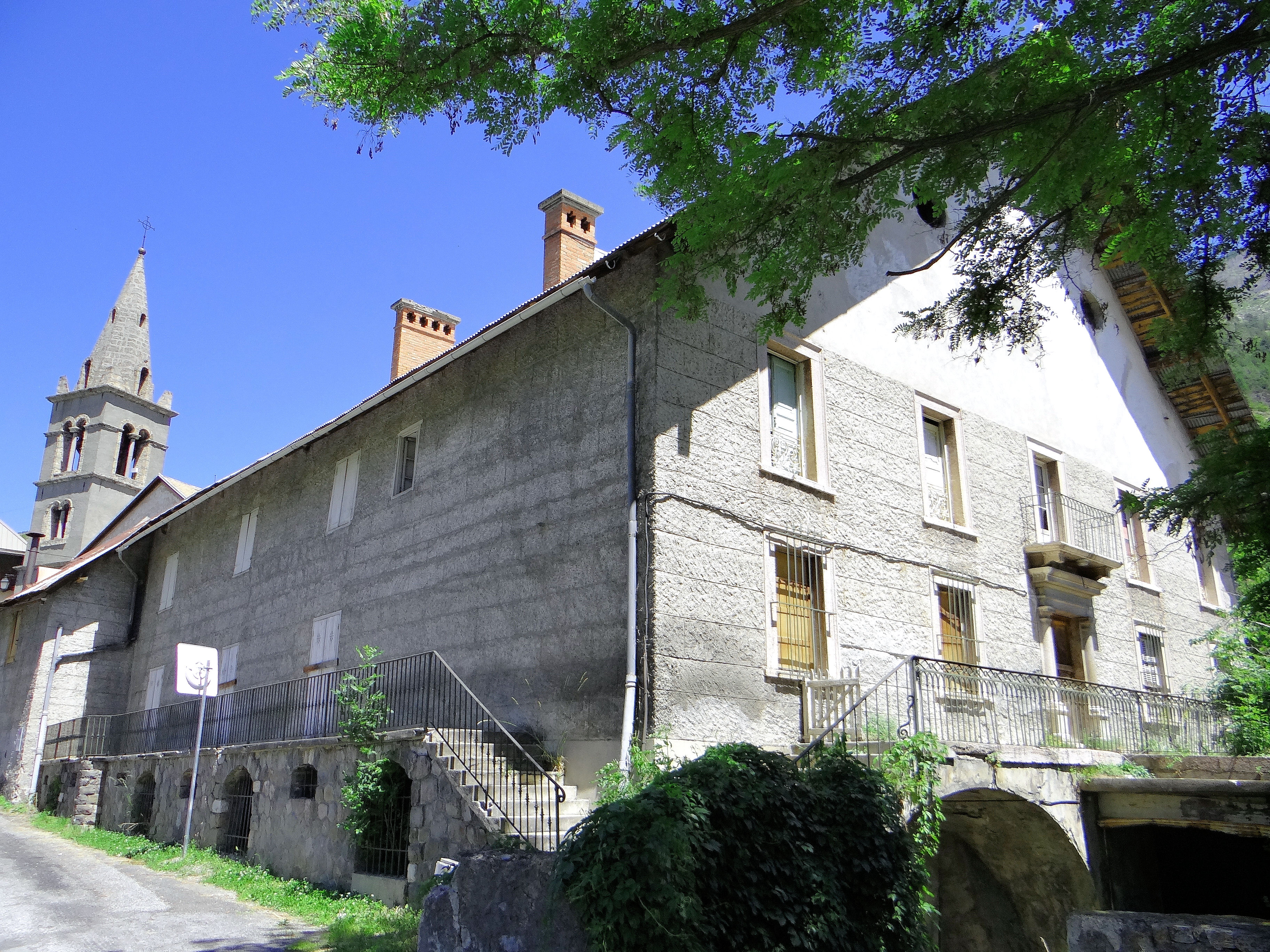 L'Argentière-la-Bessée - Maison Planche - Ensemble avec le cellier .